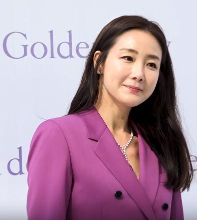 [포토월] 클래스가 다르다